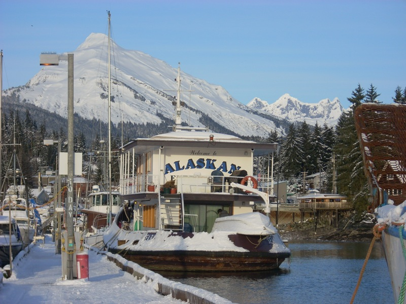 Juneau, Alaska